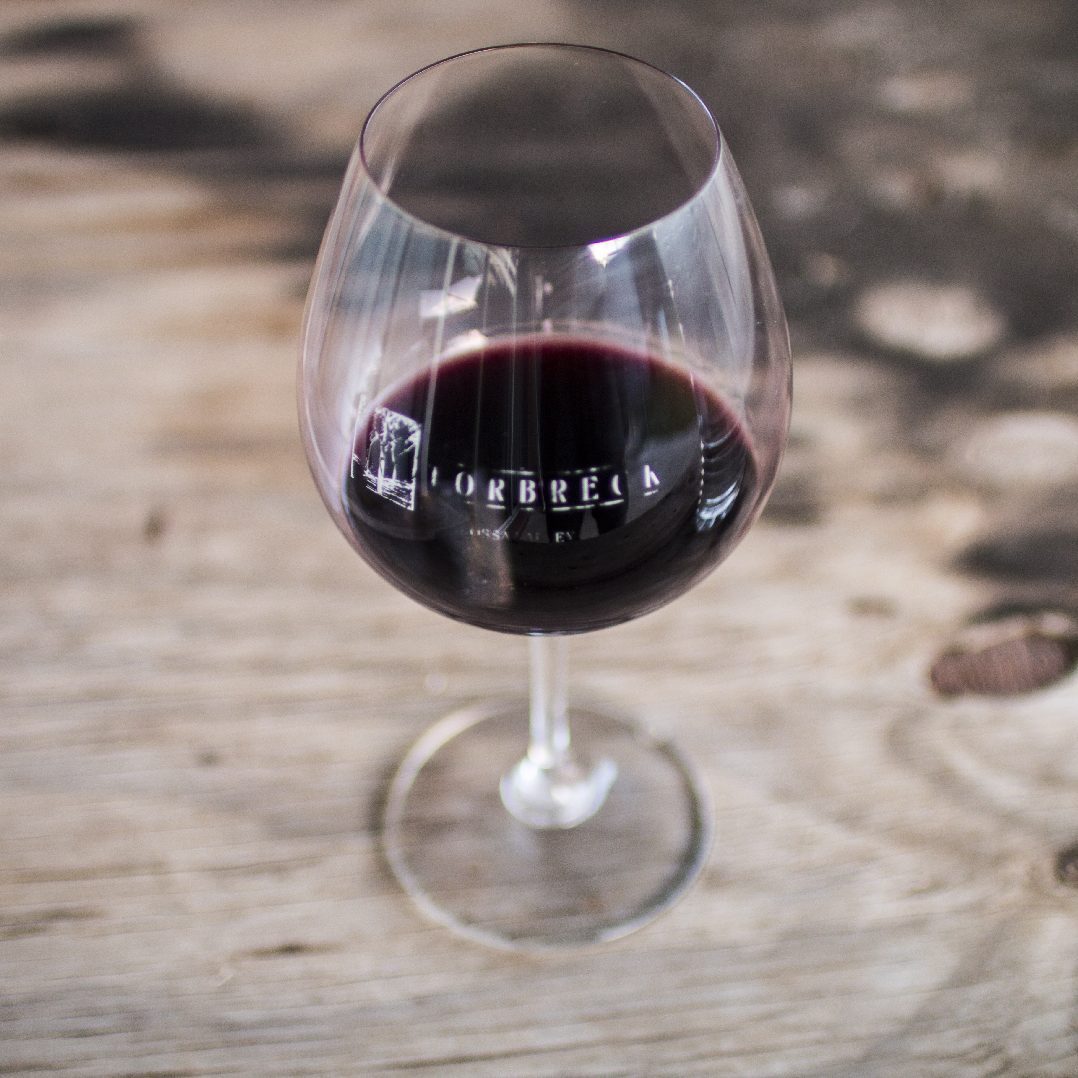 Torbreck glass, Vignoble de la Barossa Valley